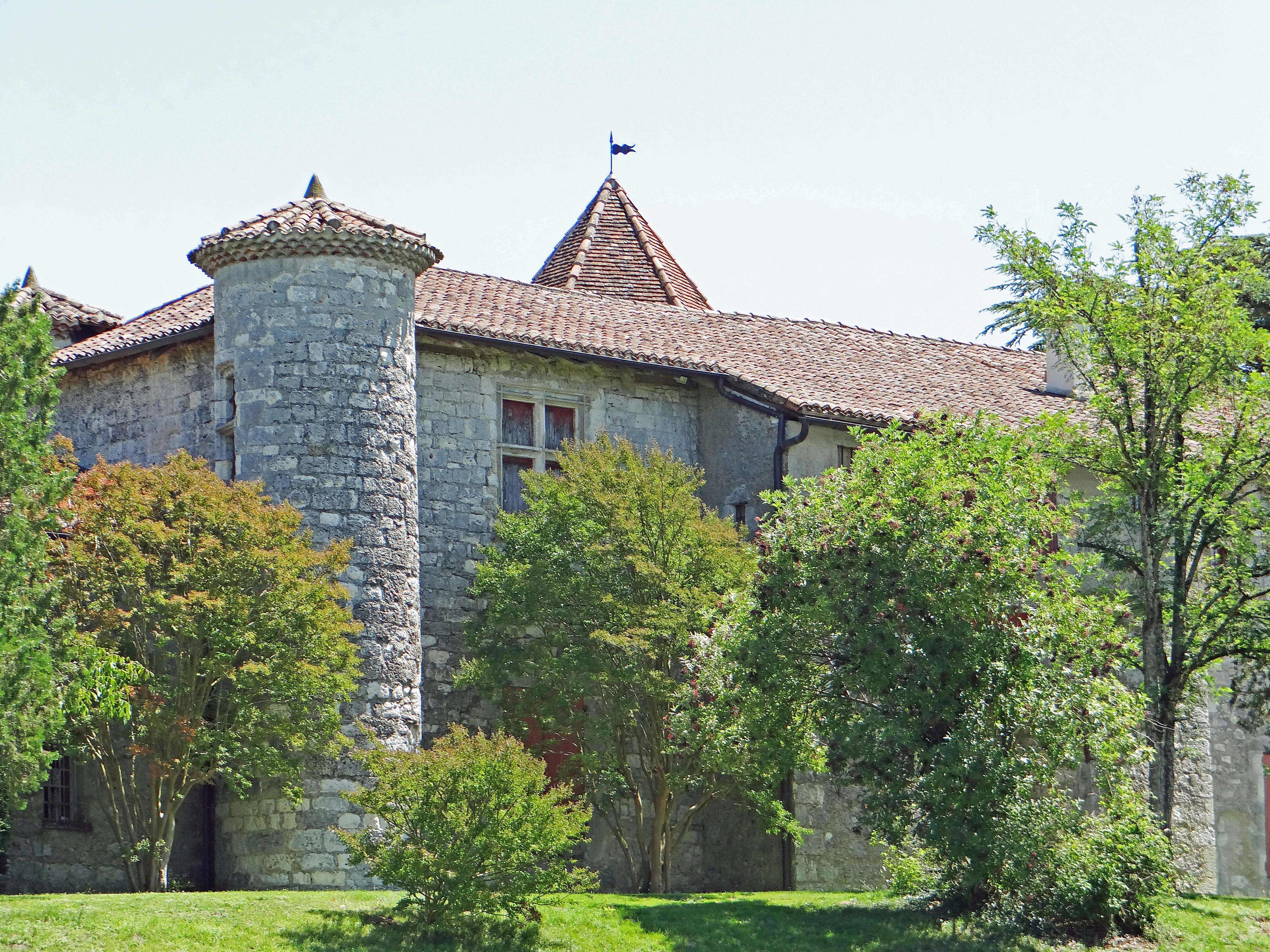 Lafox - Manoir de Prades